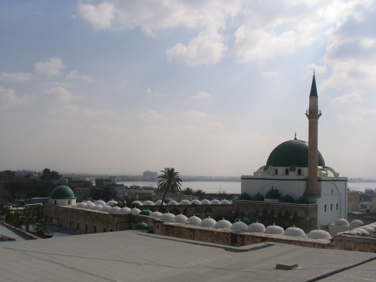 Al-Jazzar Mosque